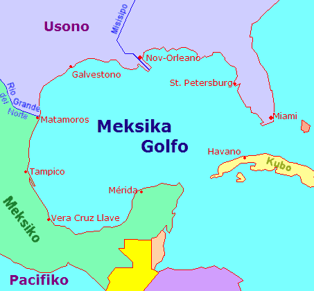 Mapeto de la Meksika Golfo (farita per GIMP)